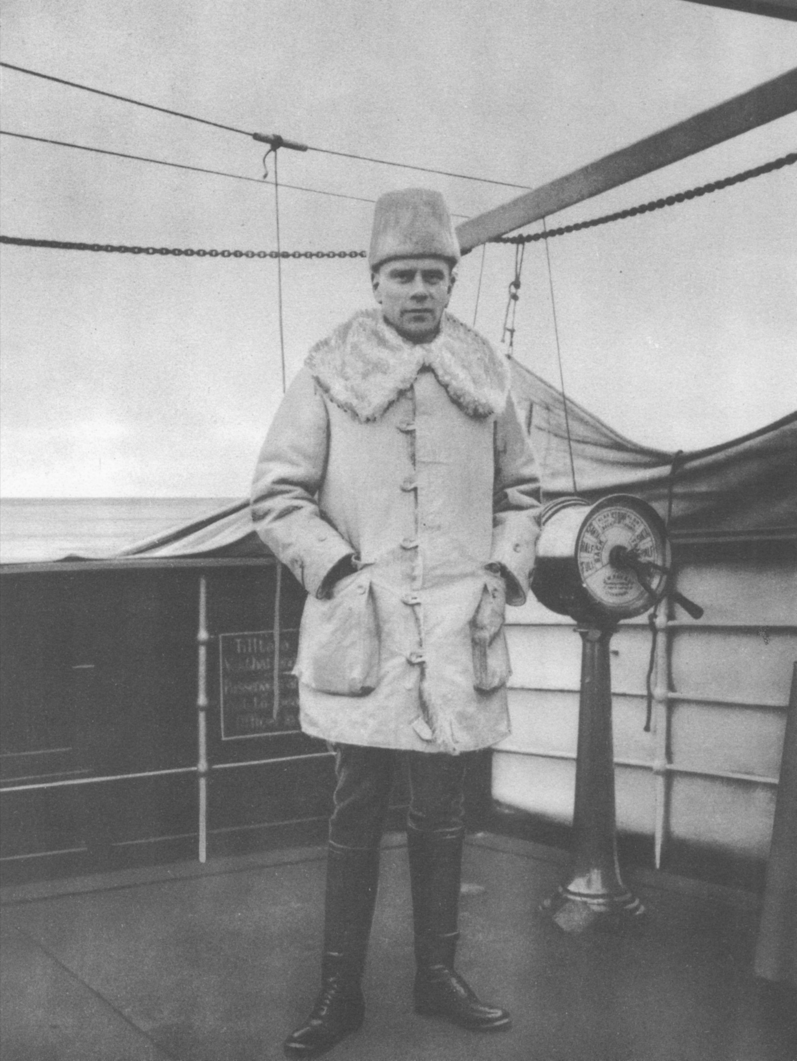 Description